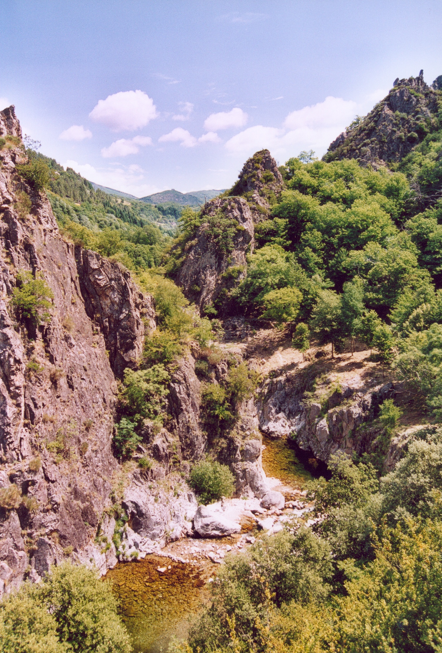 France Ardèche Thueyts Photographie prise par GIRAUD Patrick